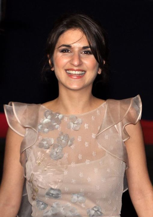 Géraldine Nakache à la cérémonie des César